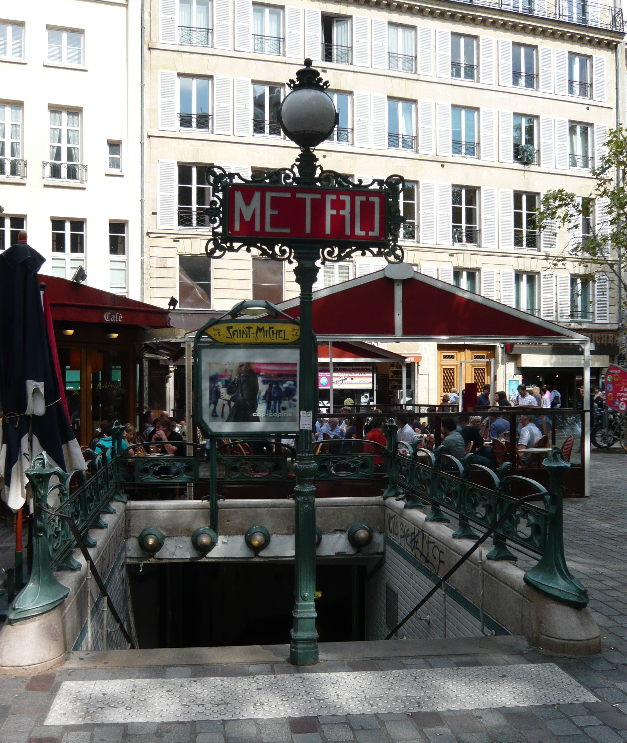 Édicule Guimard de la station de métro Saint-Michel 6e arrondissement .